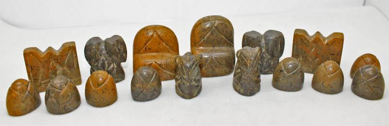 中文（台灣）: 棕色的波斯象棋棋子